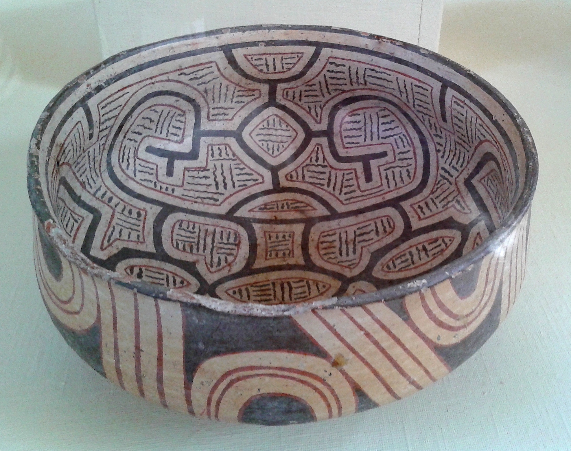 Português do Brasil: Cerâmica marajoara. Acervo de arqueologia brasileira do Museu Nacional/UFRJ - Rio de Janeiro, Brasil.